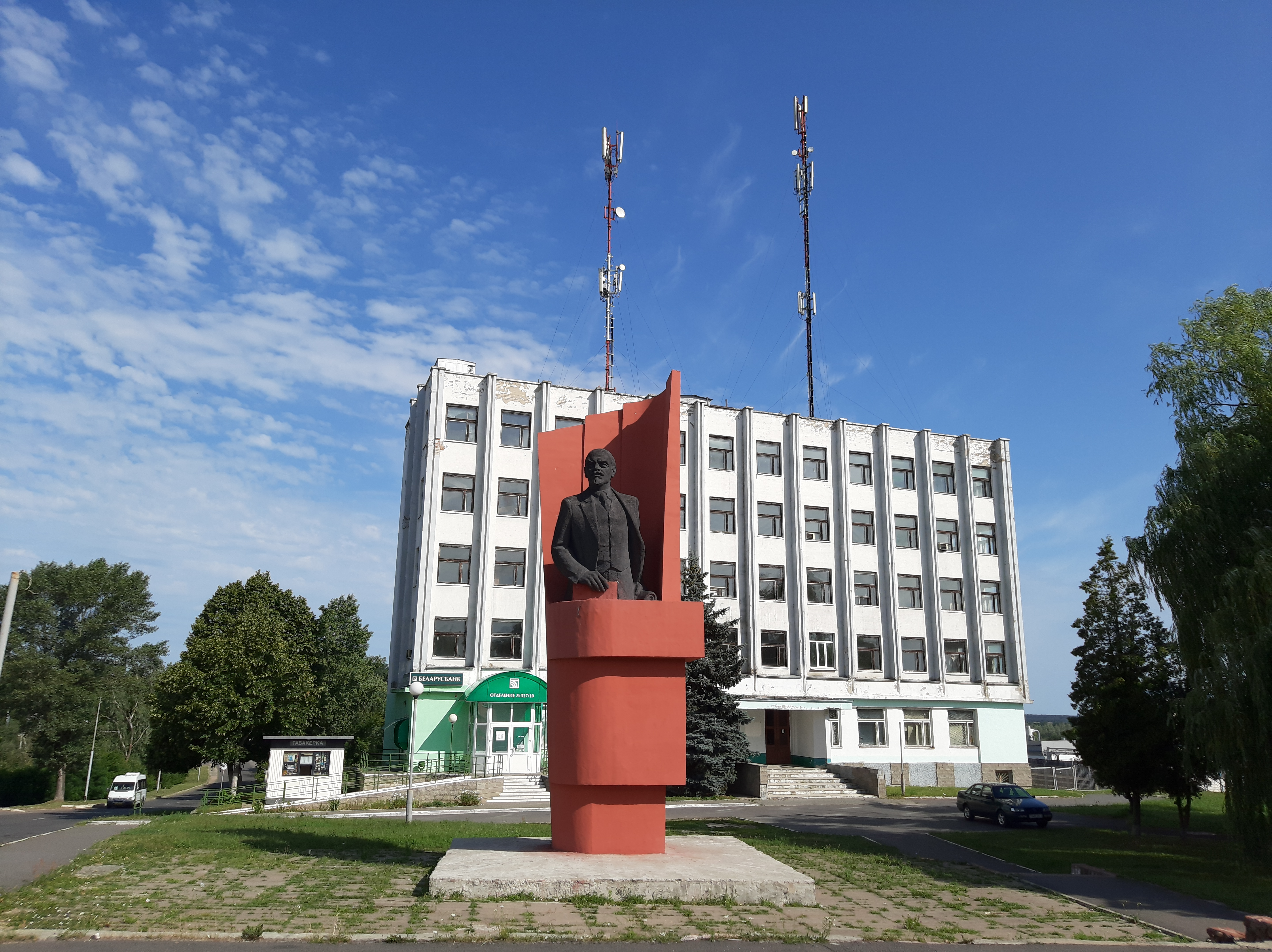 Мазырдрэў